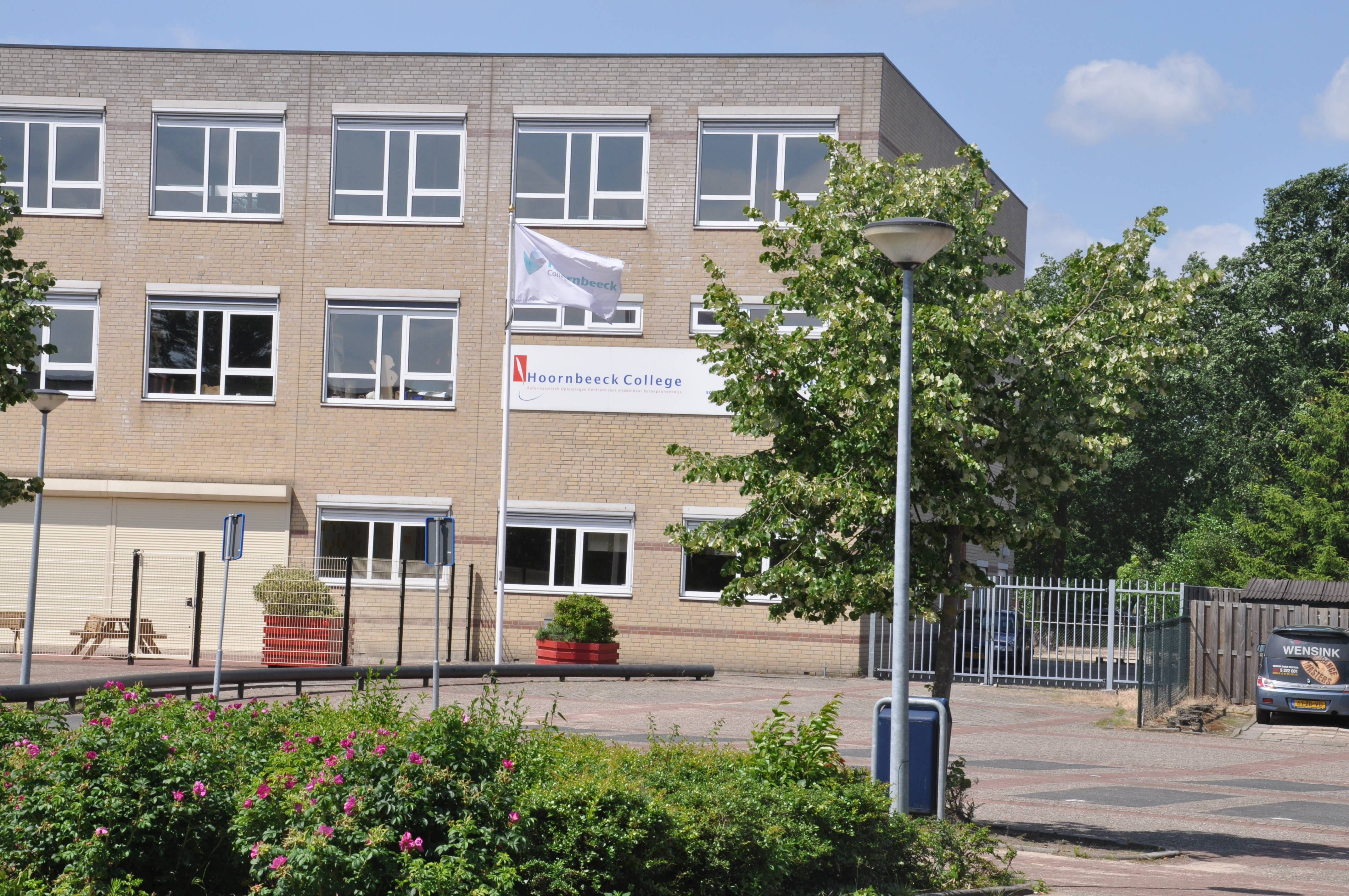 Reformatorisch MBO